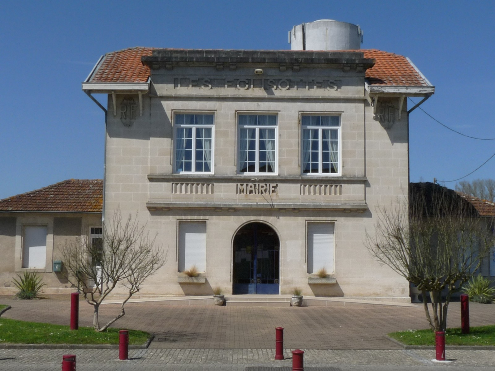 Mairie des Eglisottes, Gironde, France